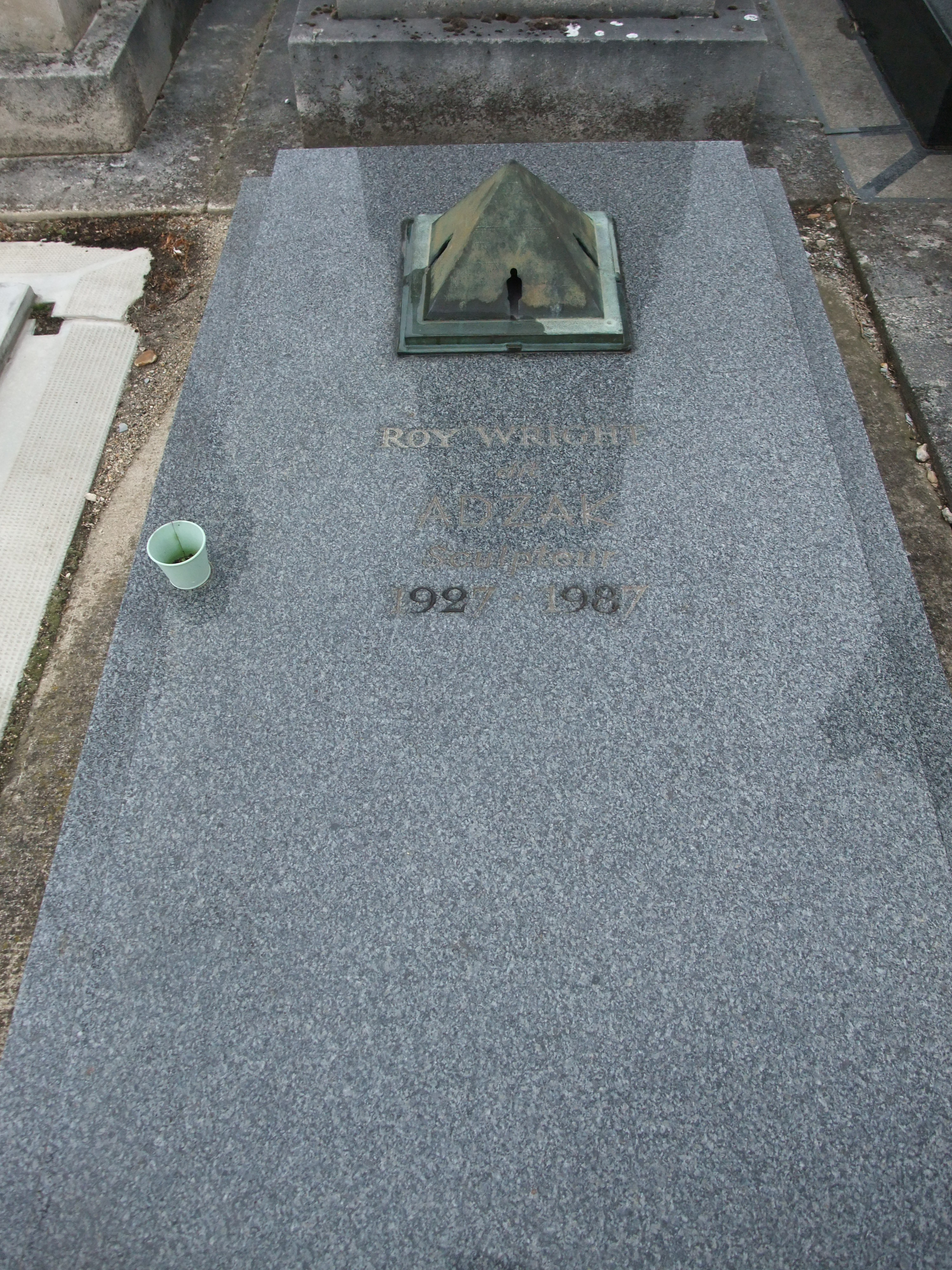 Tombe d'Adzak, cimetière du Montparnasse, Paris